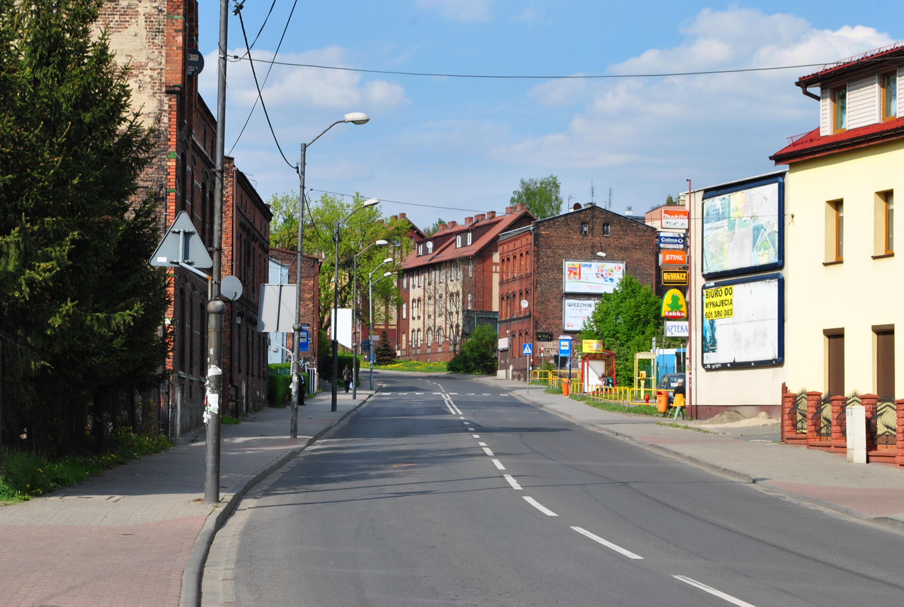 Katowice, Dąb. Ulica Agnieszki